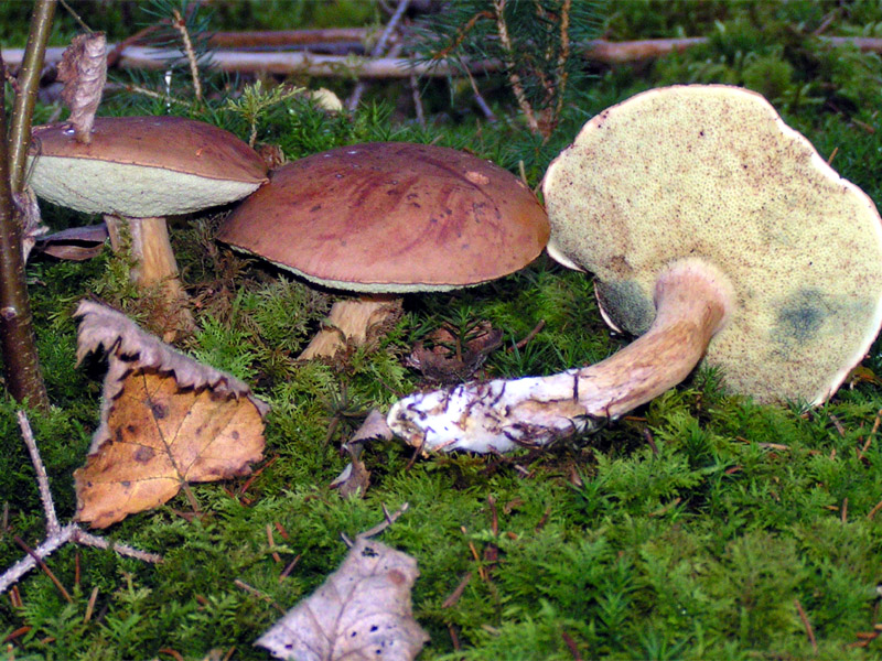 Boletus badius, syn. Xerocomus badius - Boletaceae